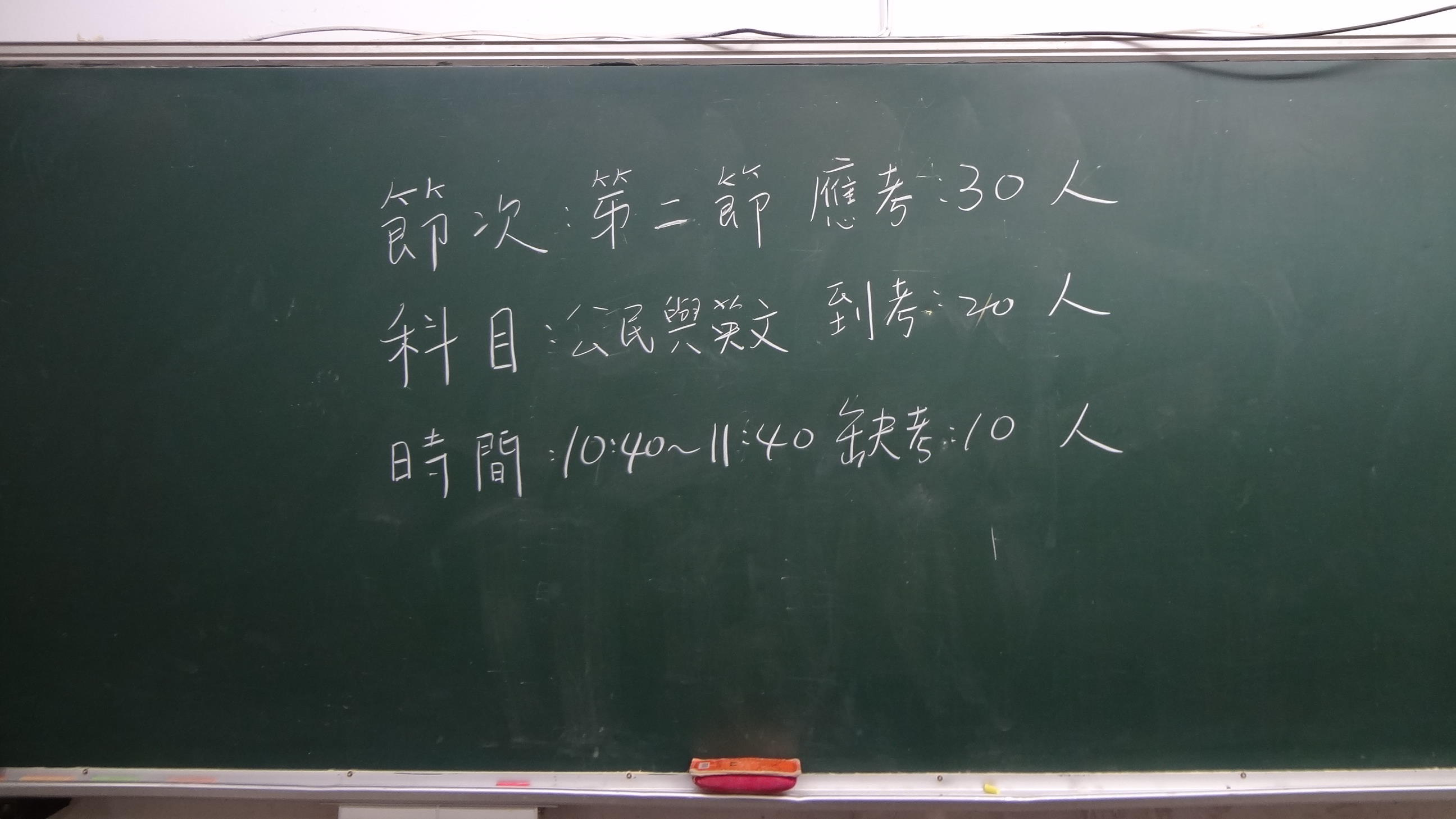 中華民國102年特種考試地方政府公務人員考試，節次、科目、時間、應考人數、到考人數、缺考人數標示，由監考人員寫在試場黑板上。